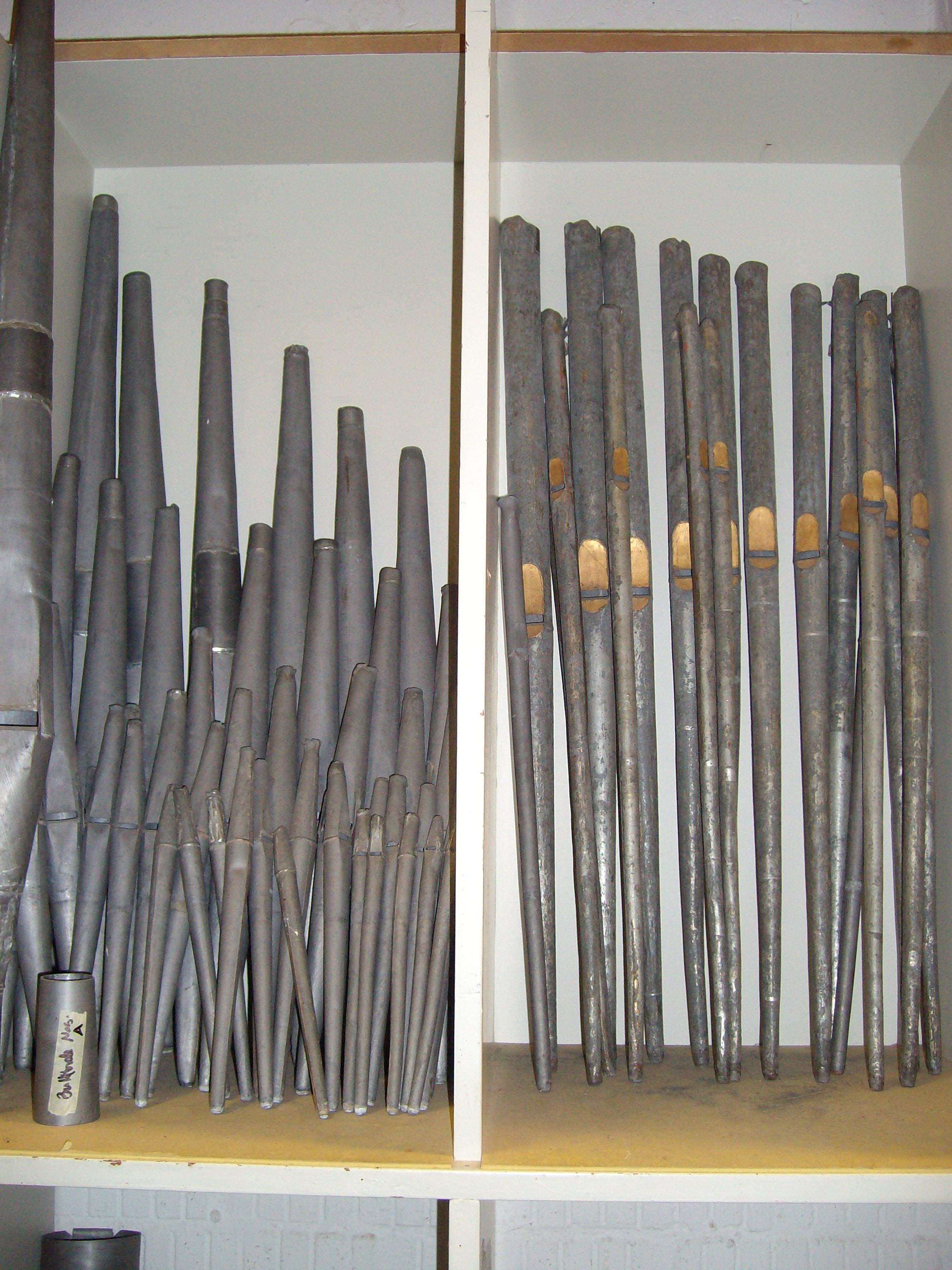 Pfeifen der Buttforder Orgel während der Restaurierung bei Ahrend